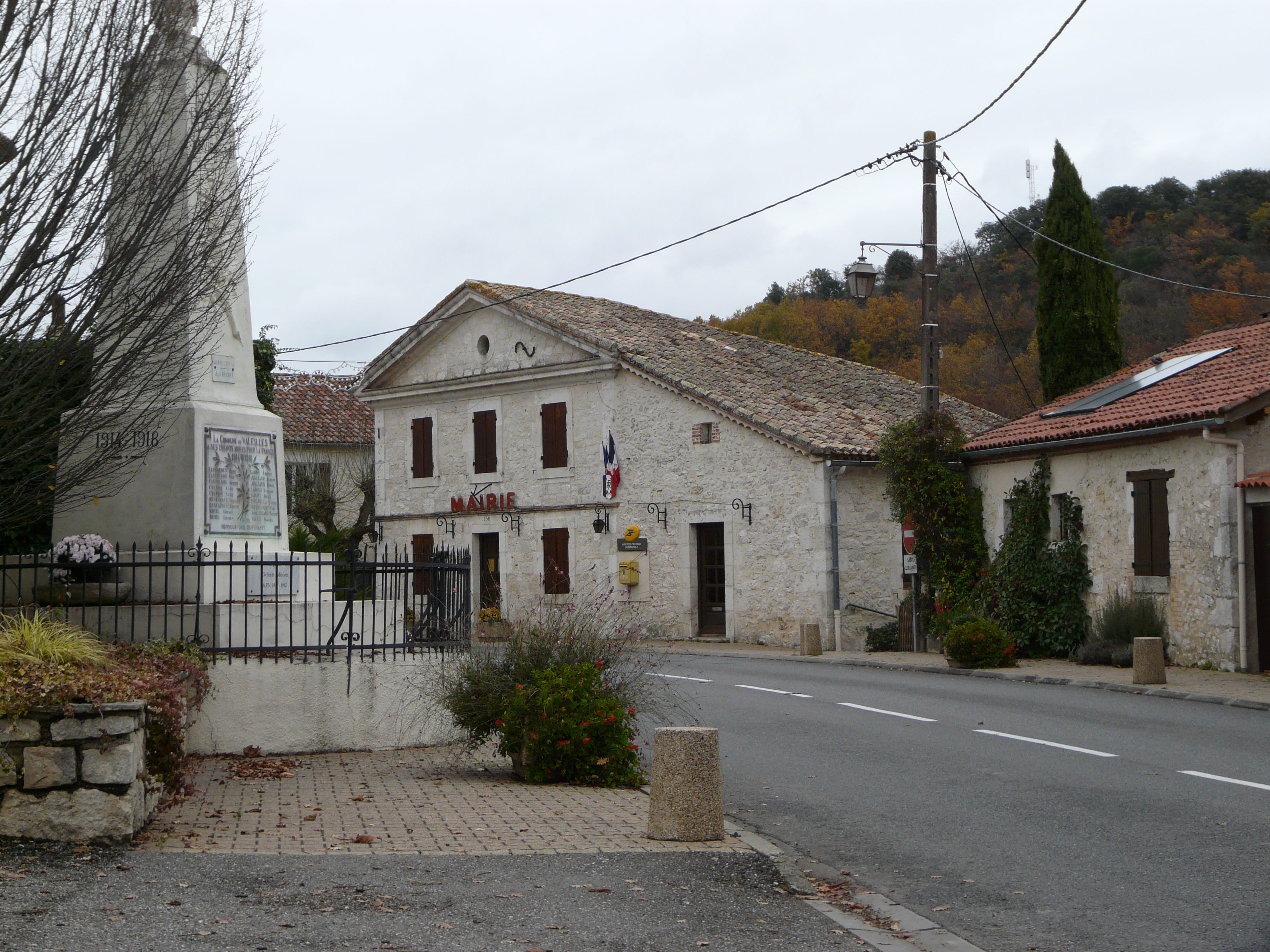 Mairie de Valeilles